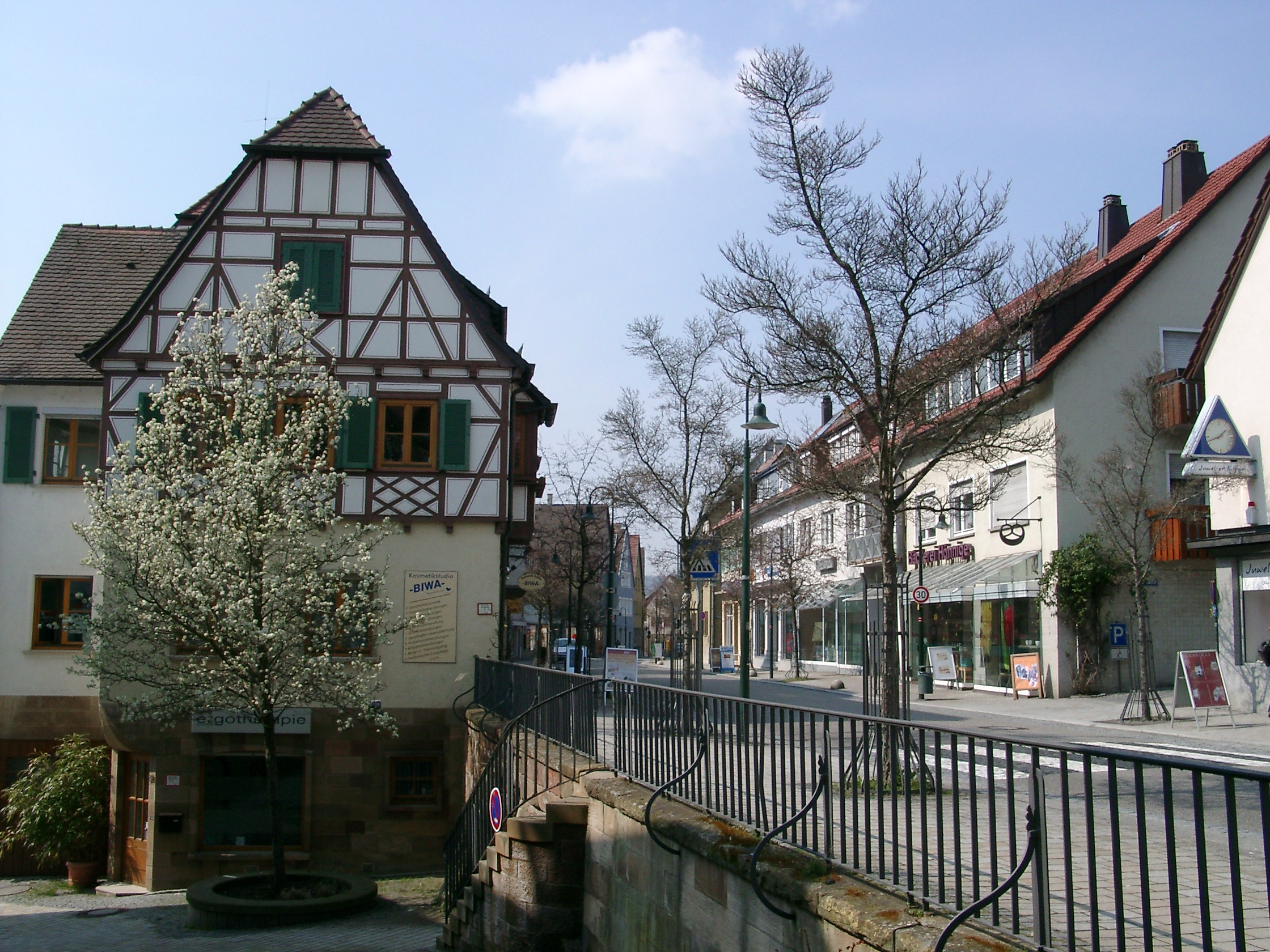 Weinsberg, Blick auf die Hauptstrasse